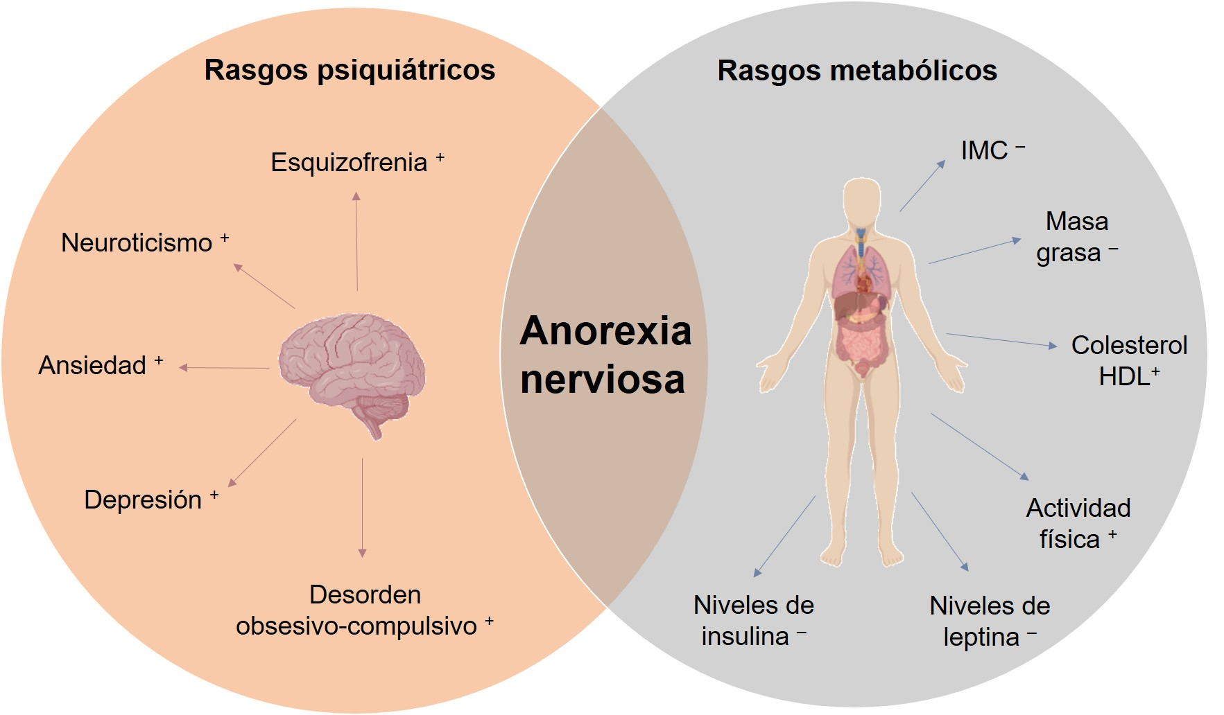 Correlaciones genéticas significativas basadas en los SNPs de riesgo de Anorexia nerviosa con rasgos psiquiátricos y metabólicos. El signo + indica correlación positiva; el -, correlación negativa.